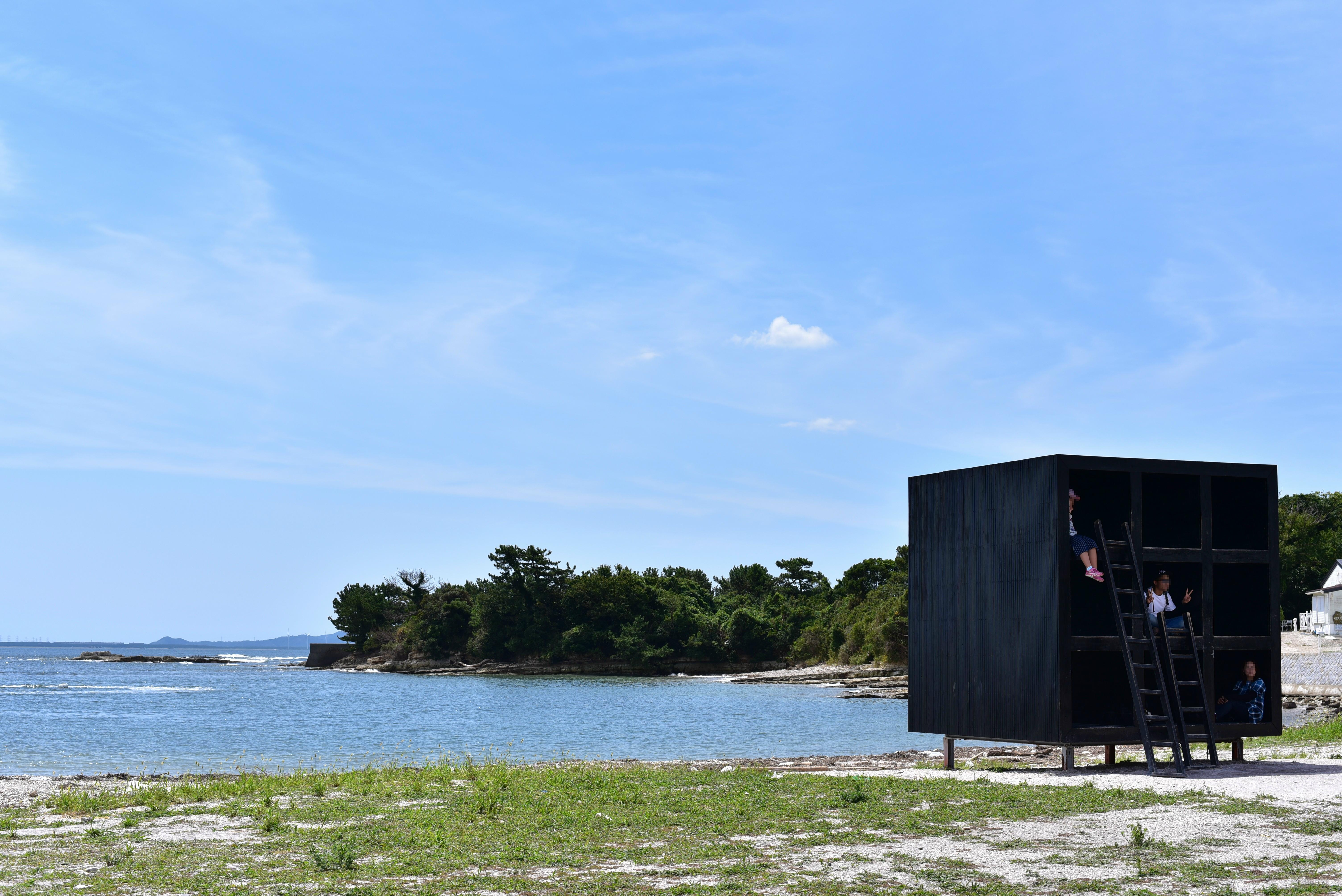 佐久島の風景 Nikon D750